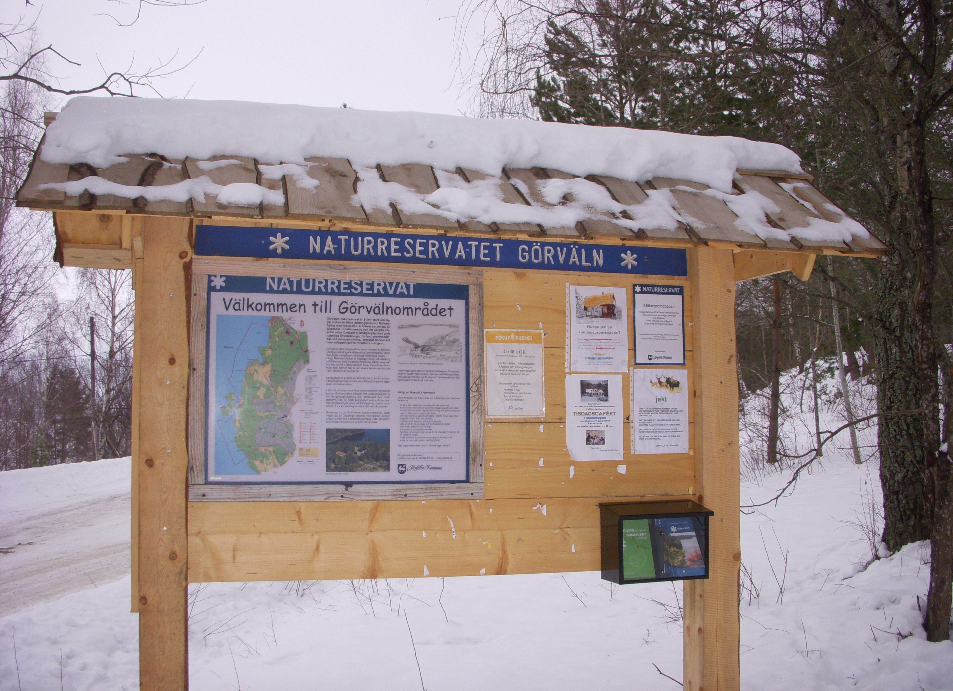 Görvälns naturreservat (infoskylt) i Järfälla kommun